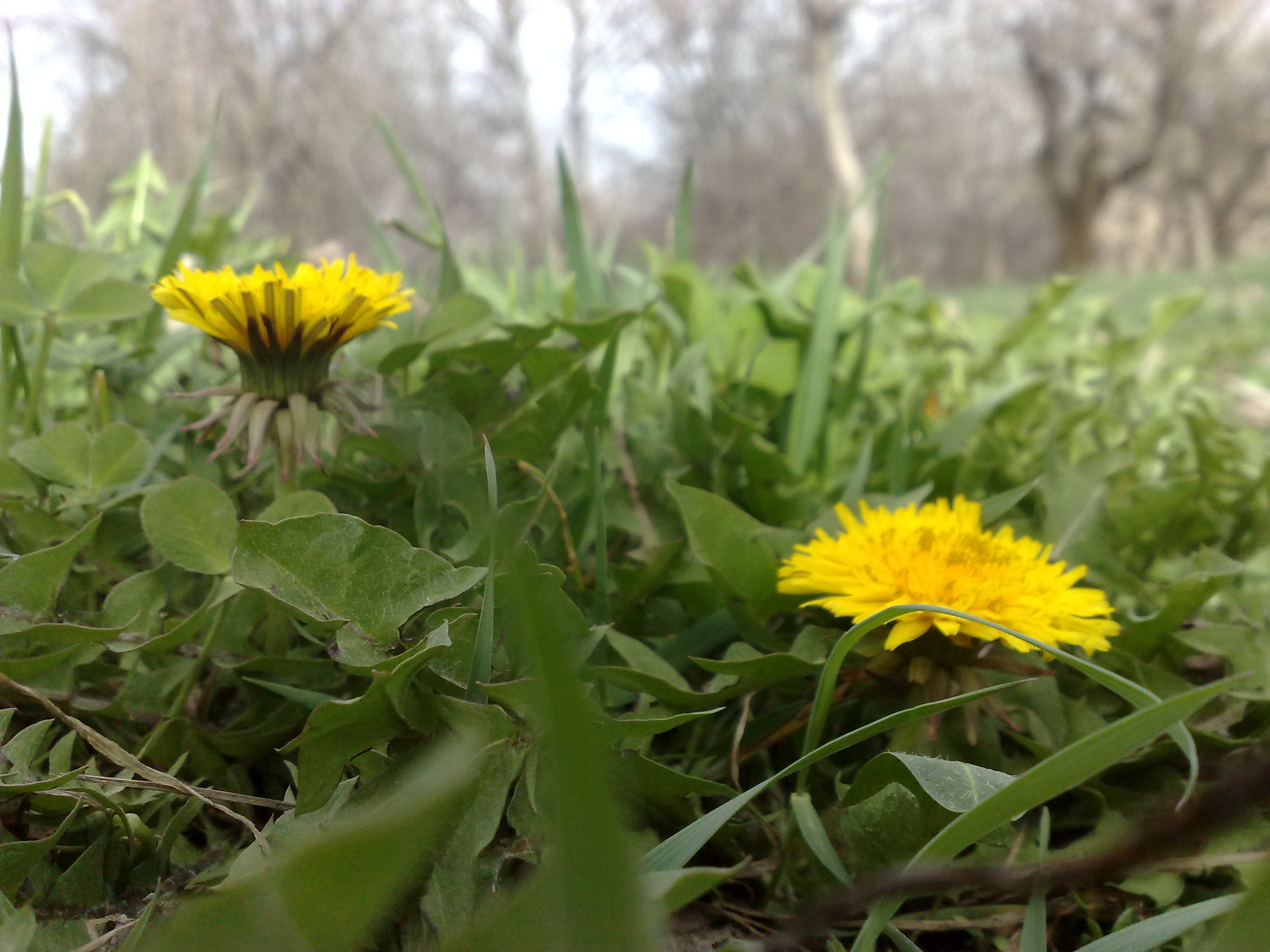 طبیعت